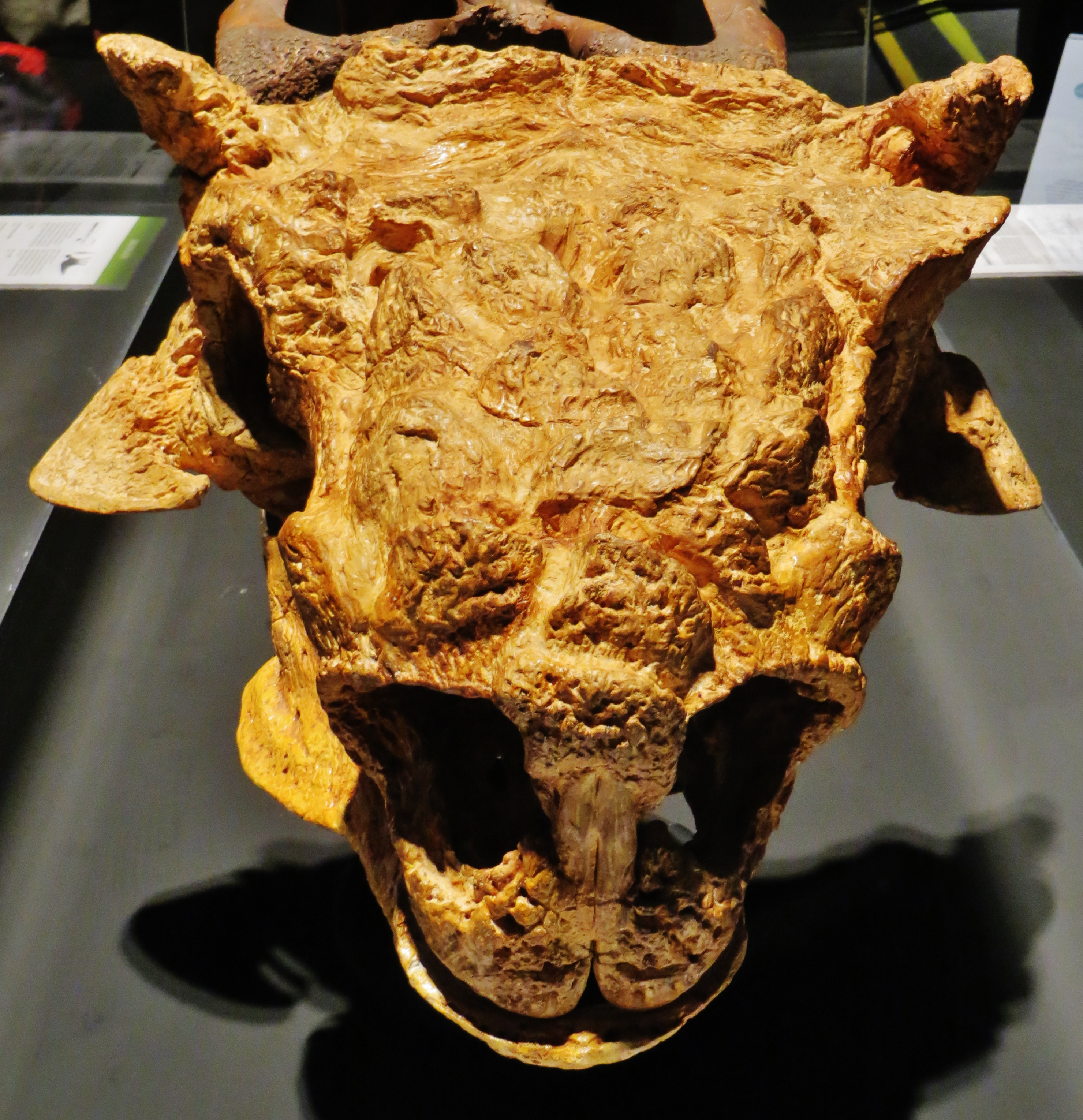 Fossil of Tarchia, an extinct reptile- Took the picture at Dinosaurium, Prague